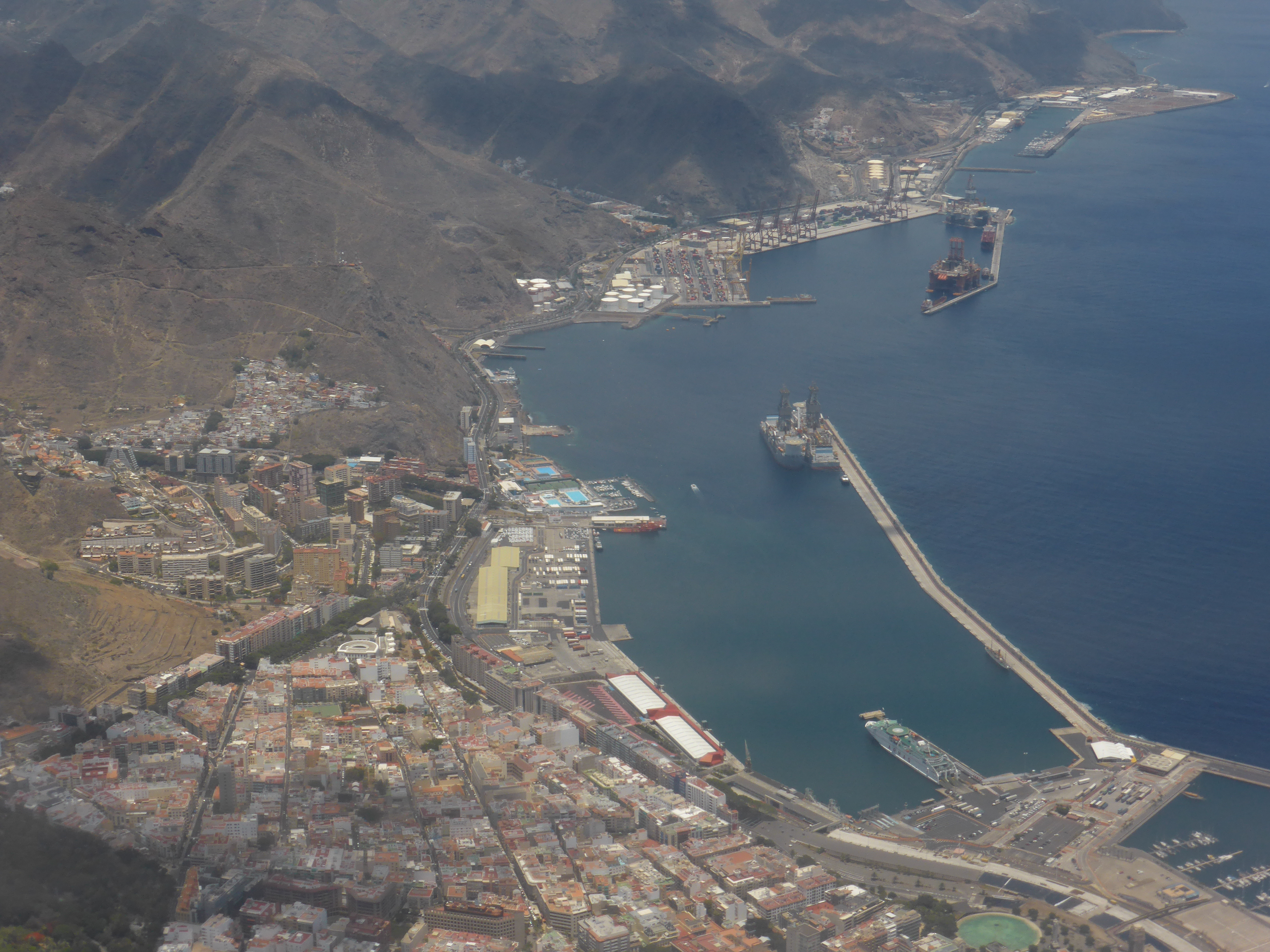 Vista parcial del puerto y la ciudad de Santa Cruz de Tenerife, en las islas Canarias. La fotografía está tomada desde un avión de línea regular, minutos antes de aterrizar en el aeropuerto Tenerife-Norte (antes llamado Los Rodeos). En la vista se ve el dique-muelle sur (el más largo), el muelle de Ribera (junto a la ciudad, avenida de Anaga), y el pequeño muelle Norte, que forman la dársena de Anaga. A lo lejos se aprecia el dique del Este. Y todavía más lejos la dársena pesquera.